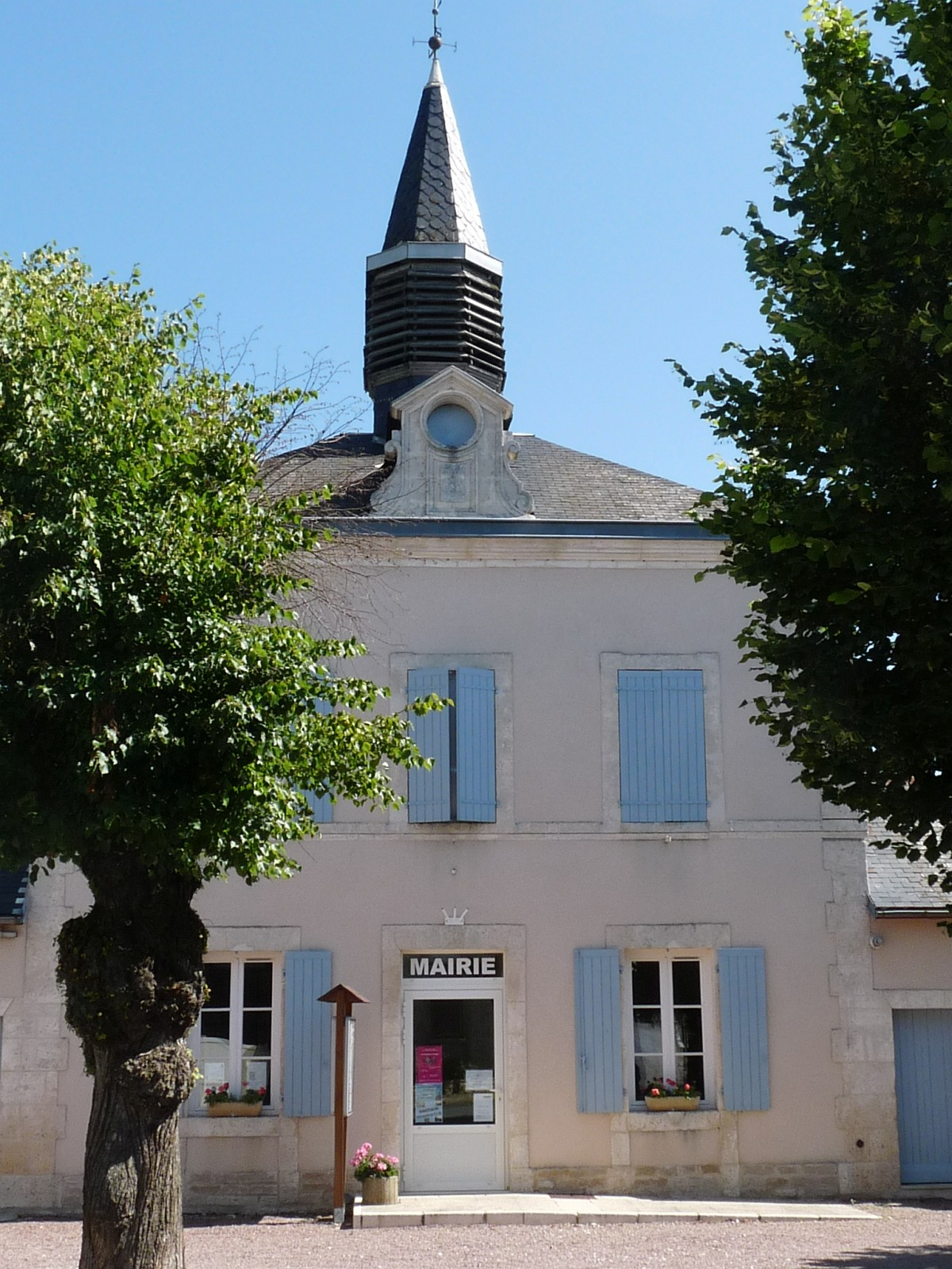 Mairie de Raix, Charente, France